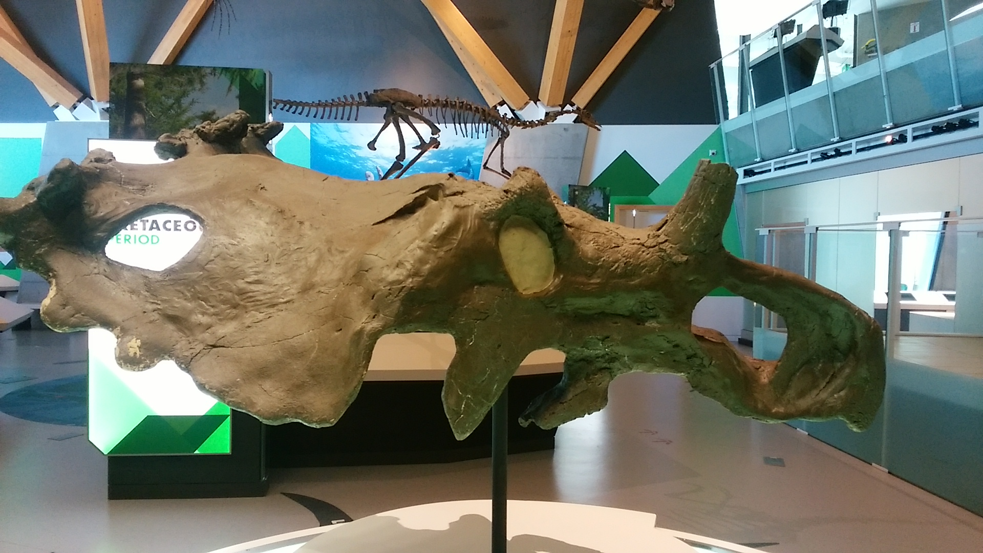 コロノサウルス・ブリンクマニ（フィリップカリー博物館所蔵）